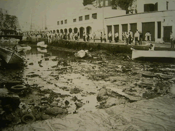 Rissaga